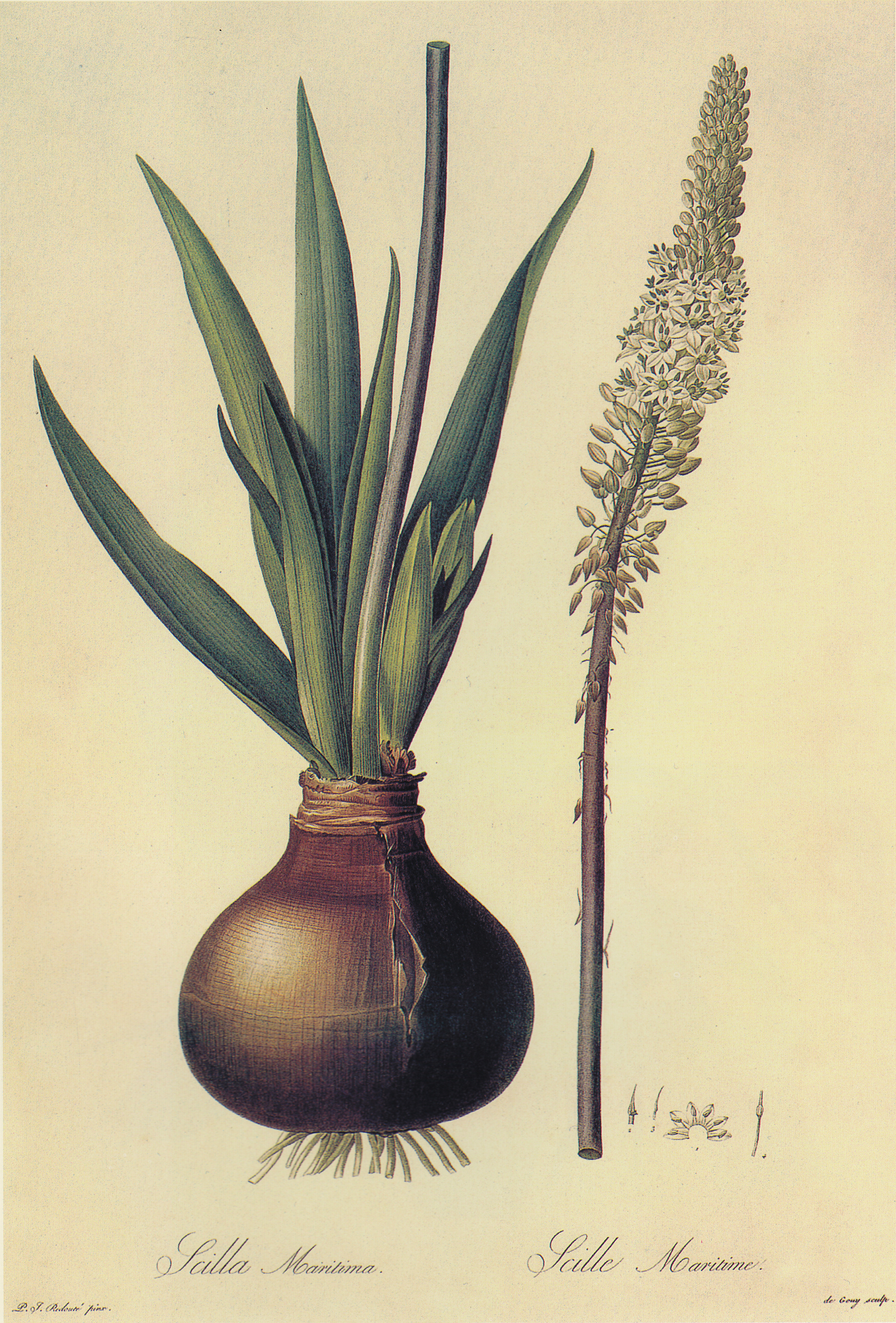 海葱。原产于沿地中海地区。